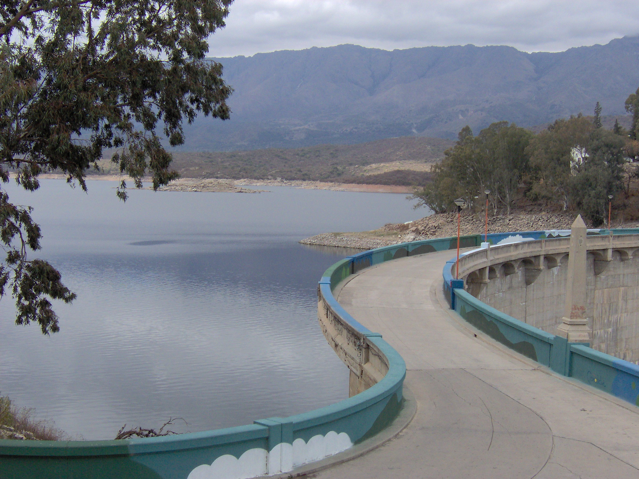 Dique La Viña, Argentina - La Viña dam, Argentina